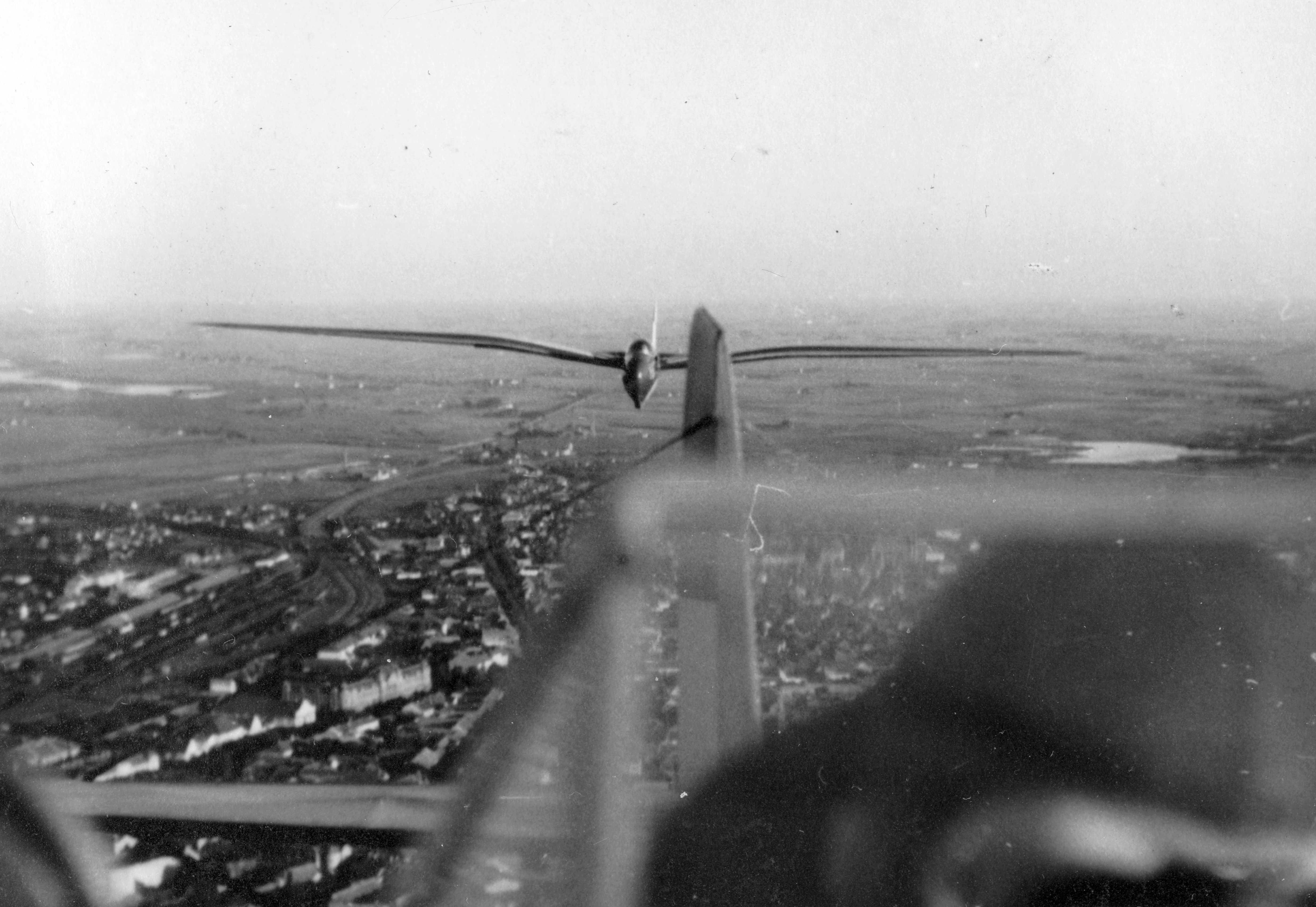 légifotó a város felett. Vitorlázó repülőgép vontatókötélen. Location: Serbia, Subotica Tags: airplane, sailplane, aerial photo, bird's eye view Title: légifotó a város felett. Vitorlázó repülőgép vontatókötélen.